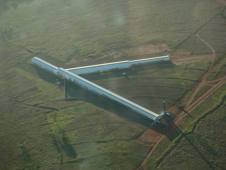 Foto aérea do Instituto Federal de Educação, Ciência e Tecnologia do Triângulo Mineiro - campus Ituiutaba.